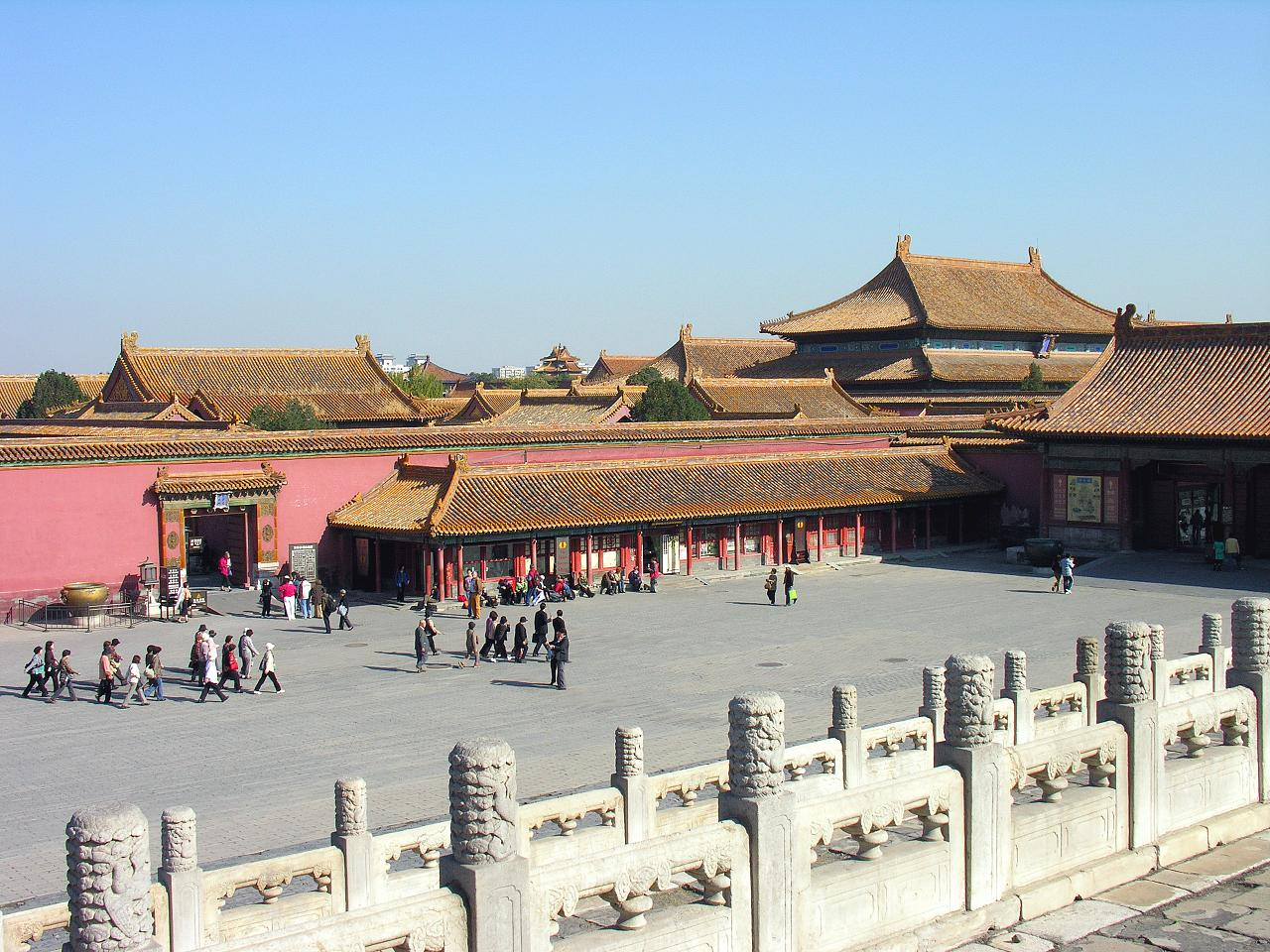 China-6211